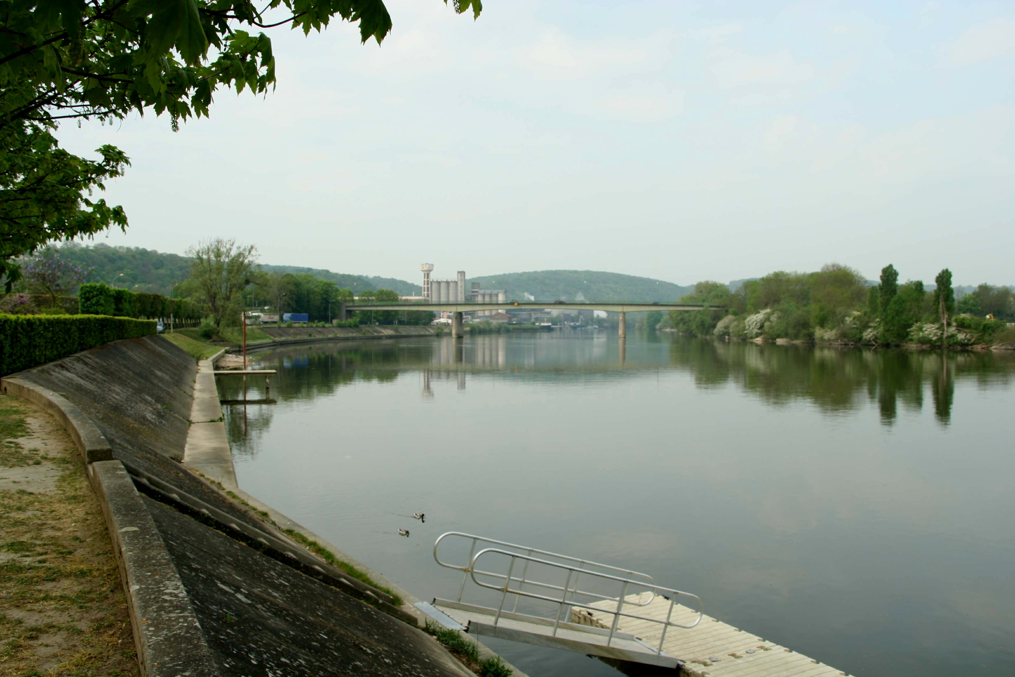 Pont sur la Seine à Bonnières-sur-Seine - Yvelines (France) en arrière plan la zone industrielle.